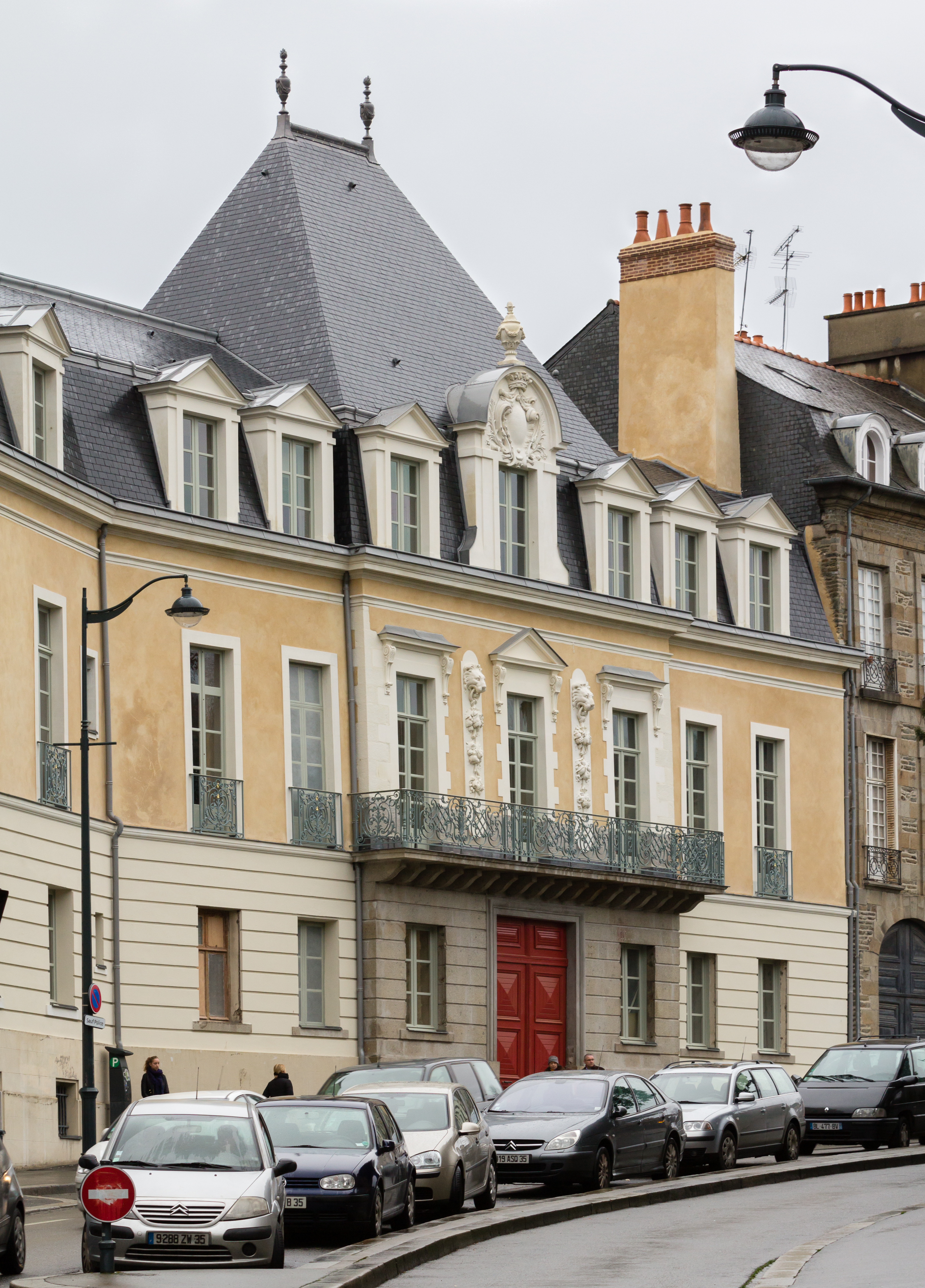 Façade de l'hôtel de Bizien, siège du tribunal administratif de Rennes, au 3 contour de la Motte.